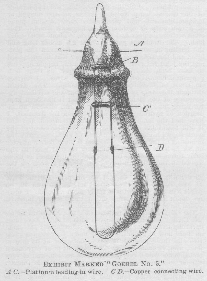 Goebel lamp No 05, litigation 1893 Boston